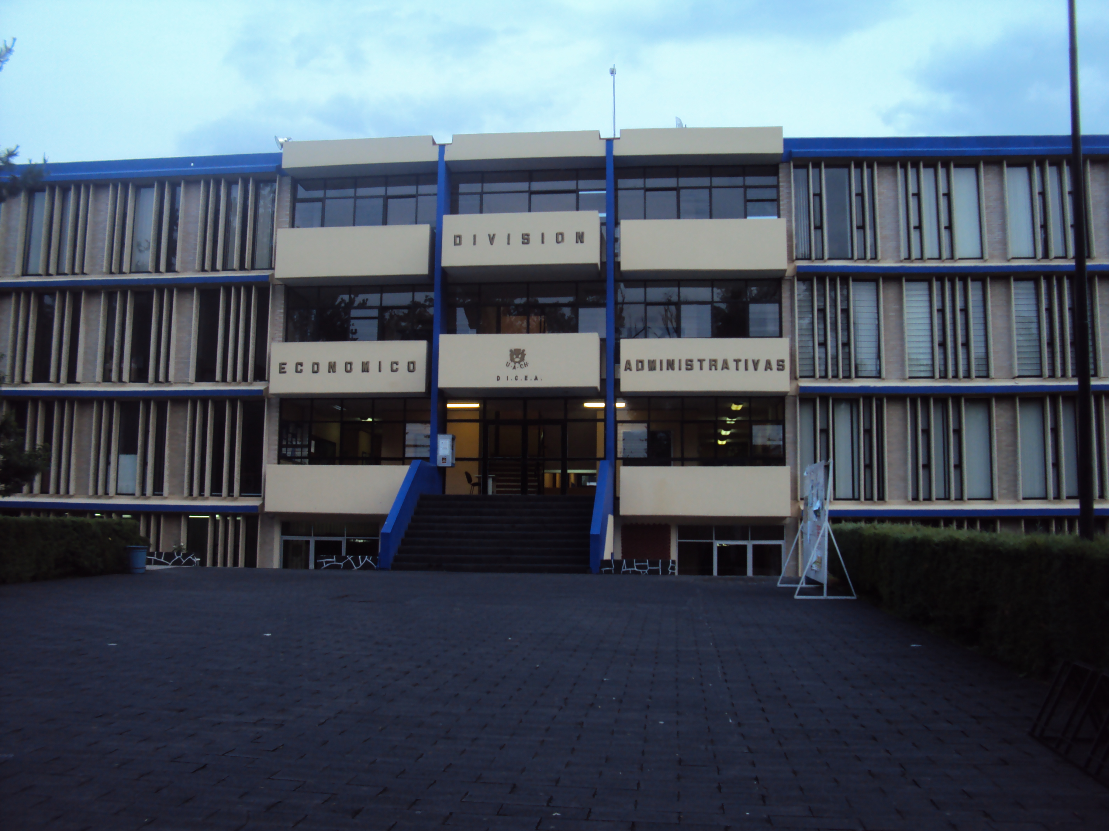 EN LA UNIVERSIDAD AUTÓNOMA CHAPINGO ESXISTE DIFERENTES DEPARTAMENTO ASÍ COMO DORMITORIOS PARA LOS INTERNADOS